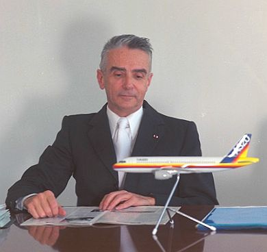 Roger Béteille à son bureau d'Airbus en 1985